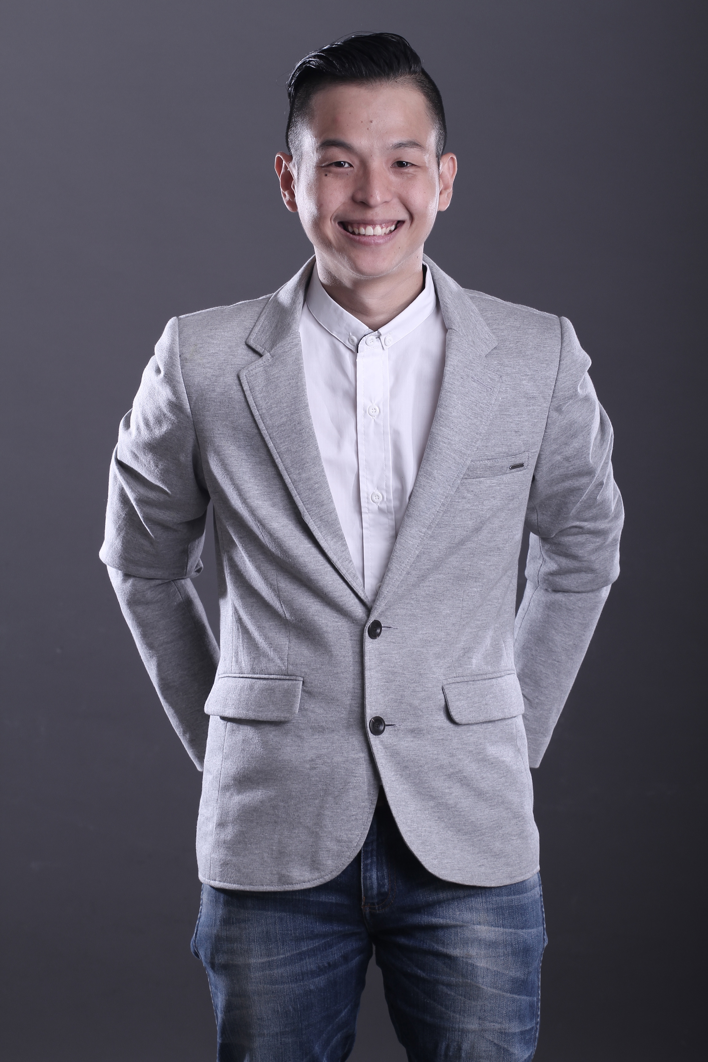 Seorang Stand up Comedian (Comic)